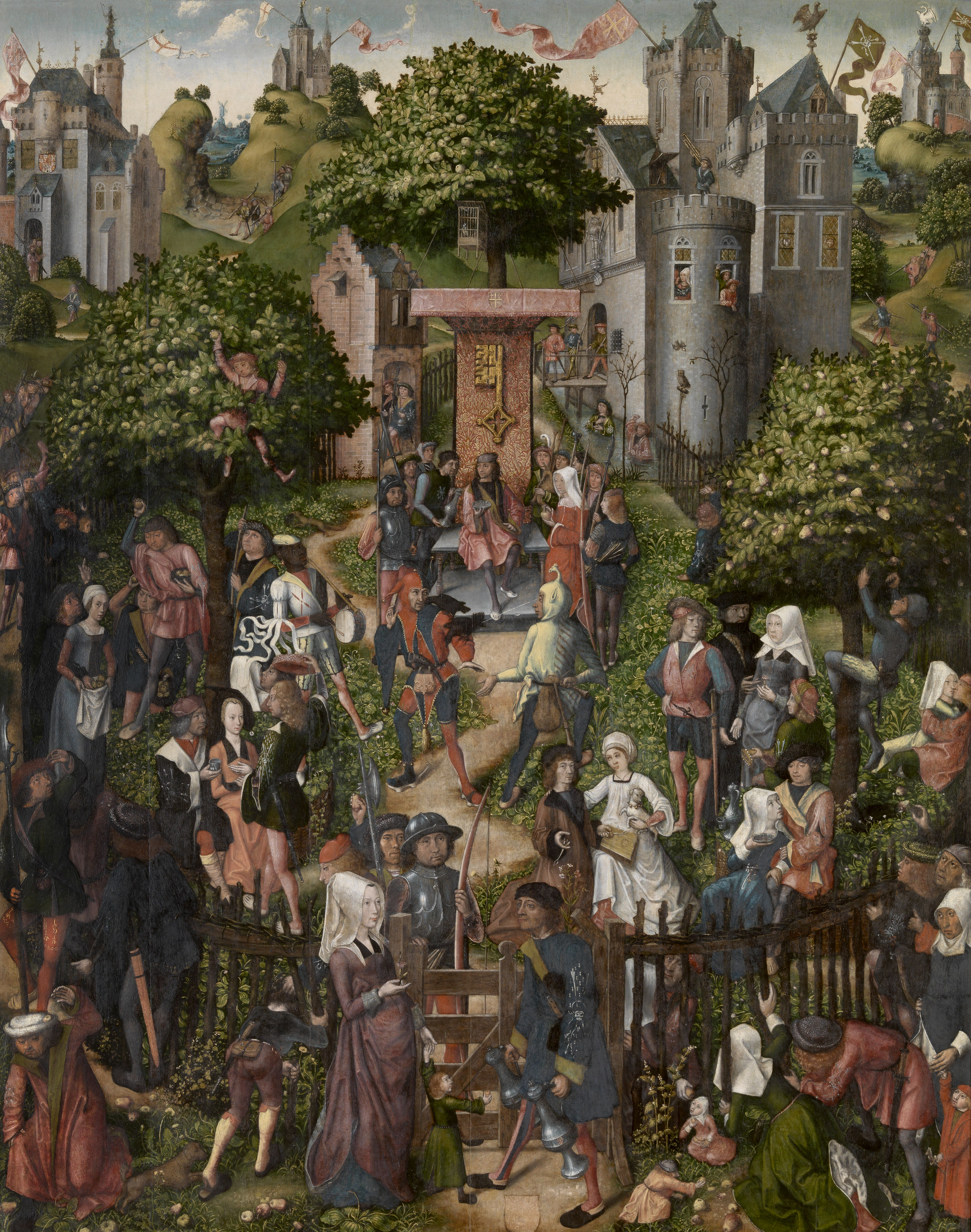 schilderij ( Meester van Frankfurt( koninklijk museum voor schone kunsten antwerpen